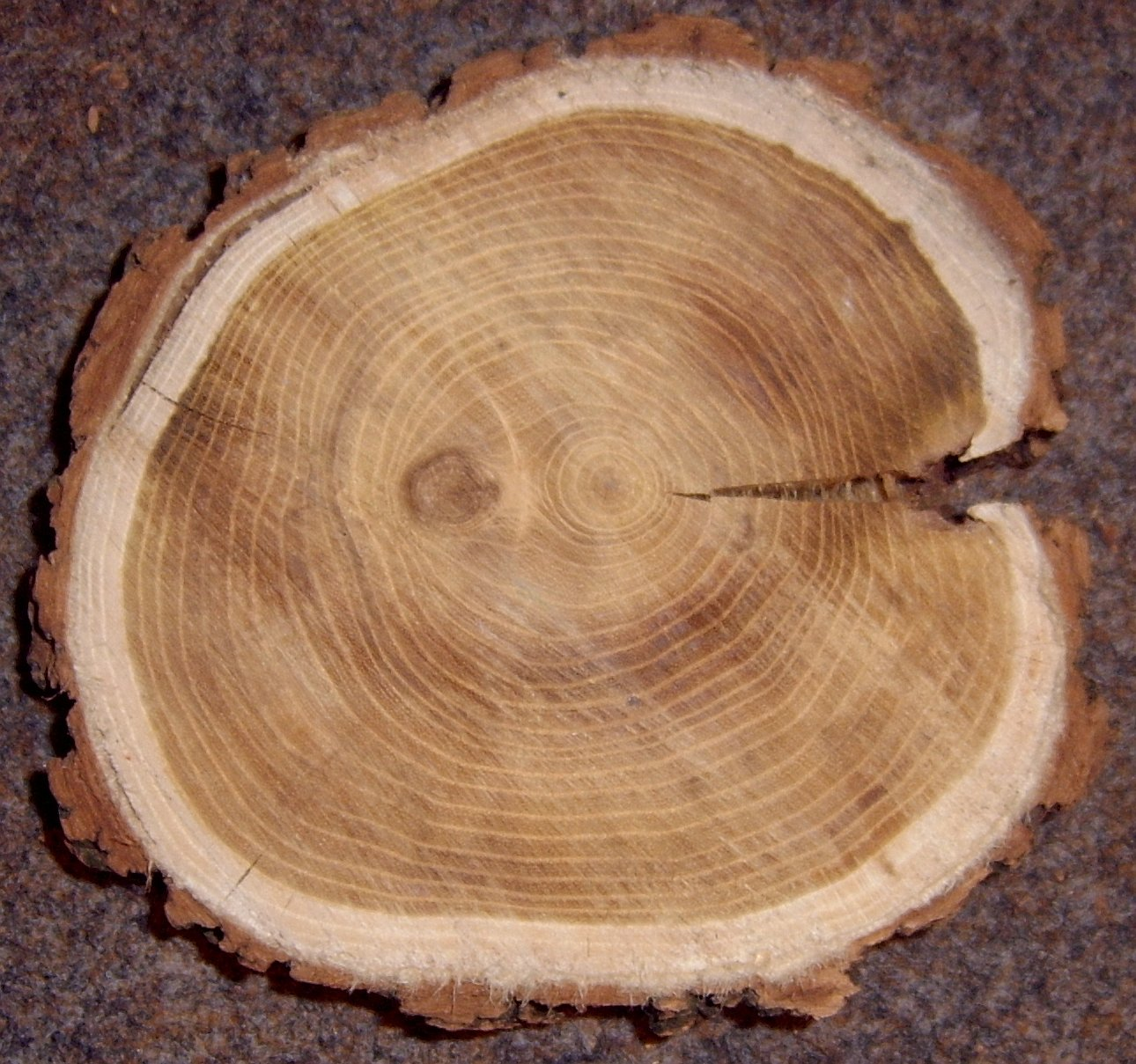 Robinia pseudoacacia